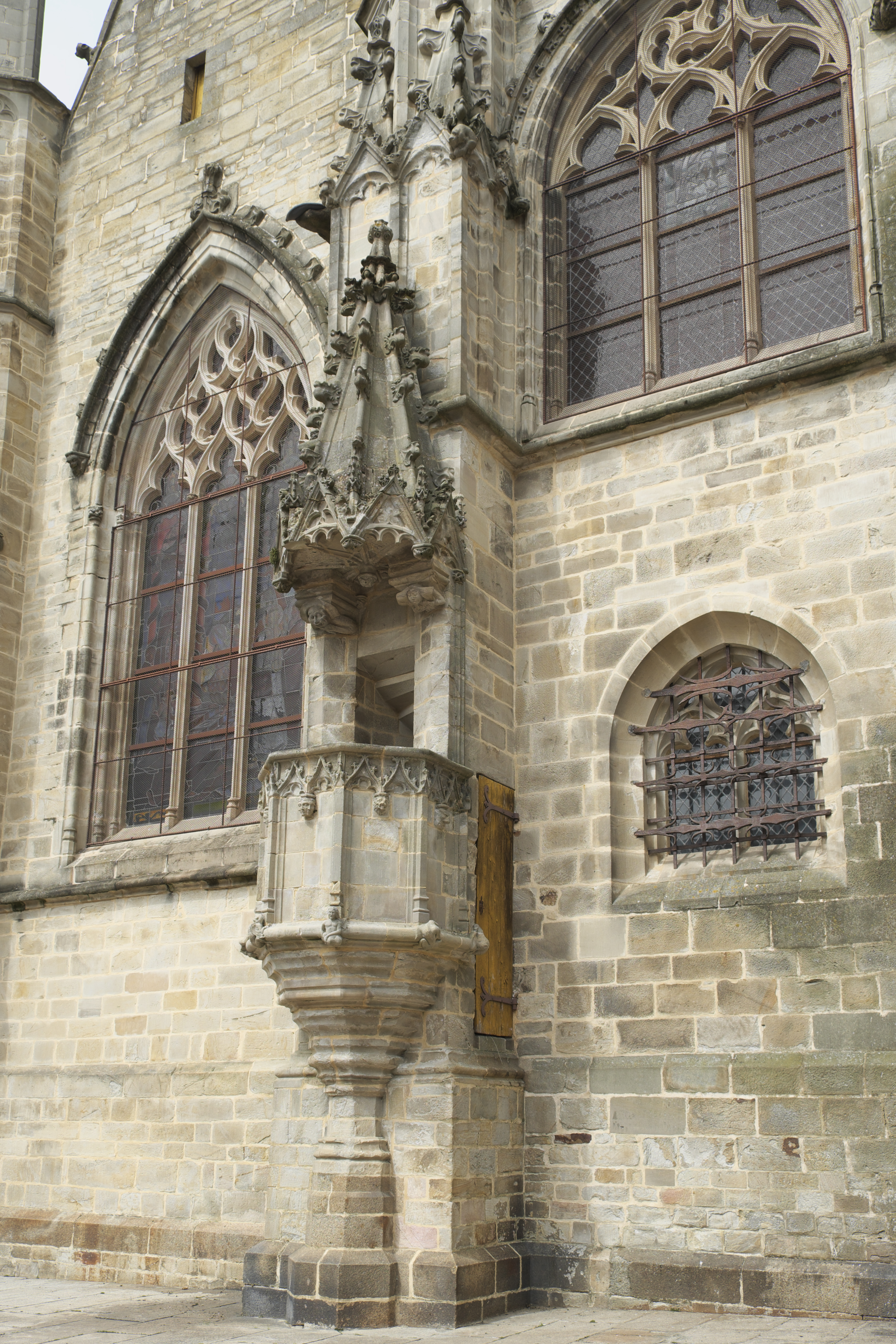 Katholische Pfarrkirche Notre-Dame in Vitré im Département Ille-et-Vilaine (Region Bretagne/Frankreich), Außenkanzel